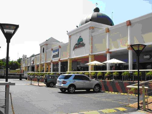 Vista del Paseo Carmelitas, Asuncion, Paraguay